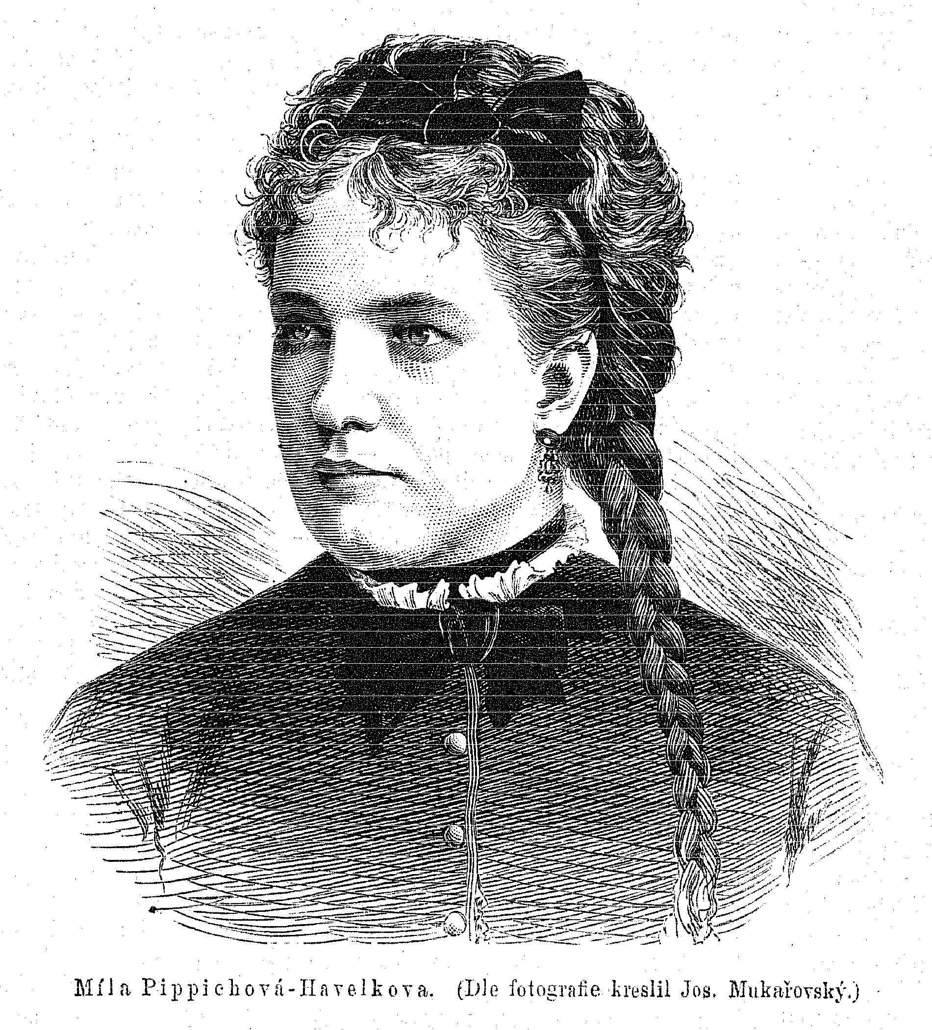 Portrait of Miloslava Pippichová-Havelková (1847 - 1878), Czech opera singer.